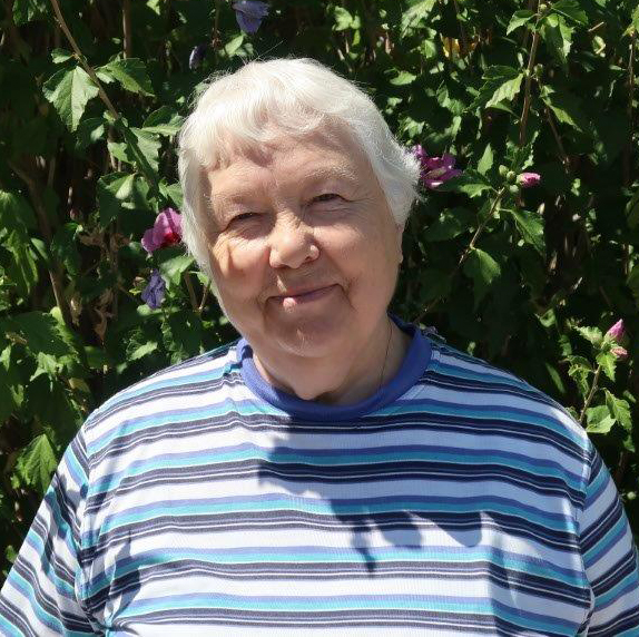 Нина Фёдоровна Аверина, советский, российский книговед, журналист писатель-краевед, поэт.